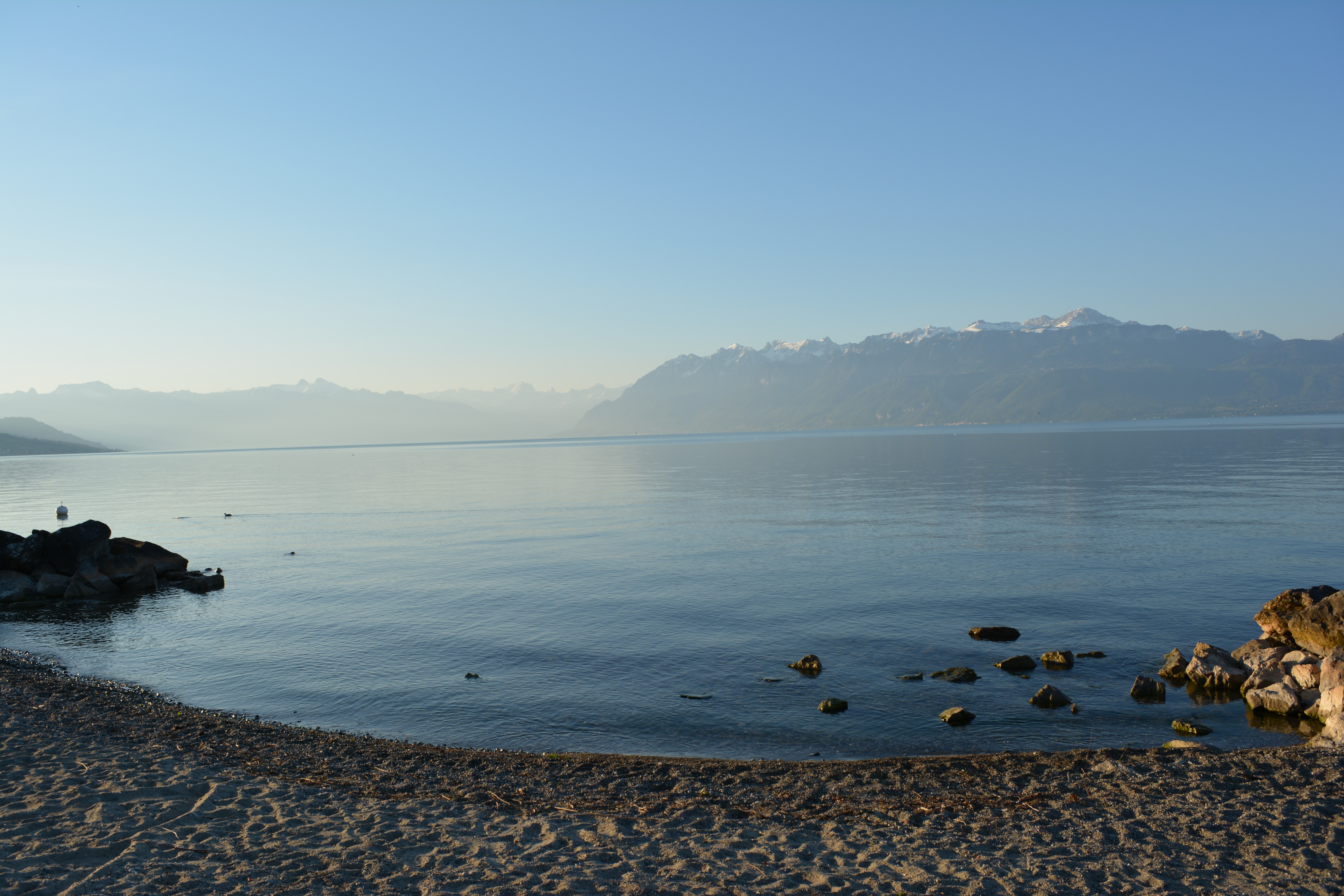 Ville de Pully, Sentier des Rives du Lac